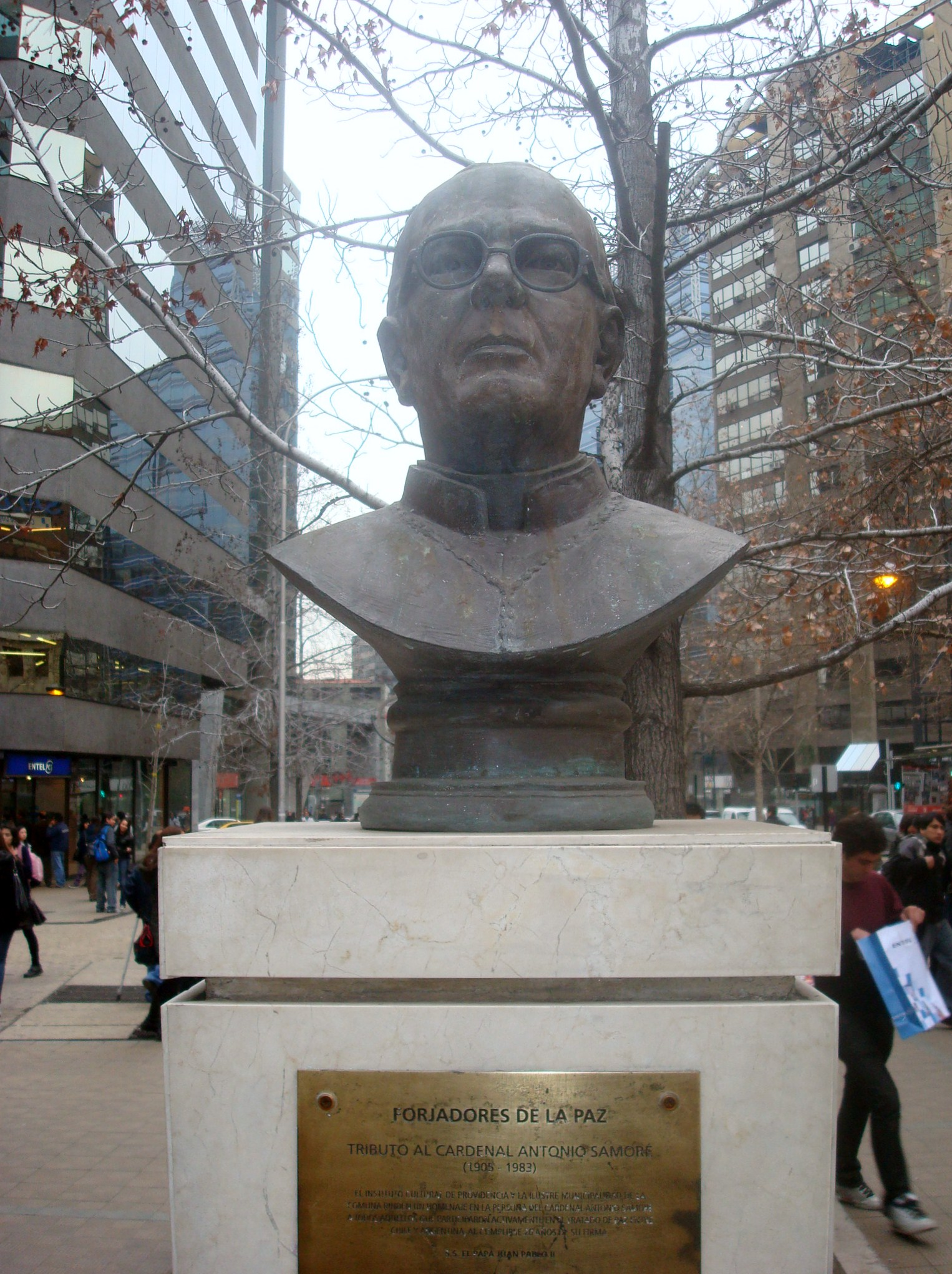 Busto del cardenal Samoré en la plaza homónima, Providencia, Santiago de Chile; la escultura es obra del chileno Joaquín Mirauda